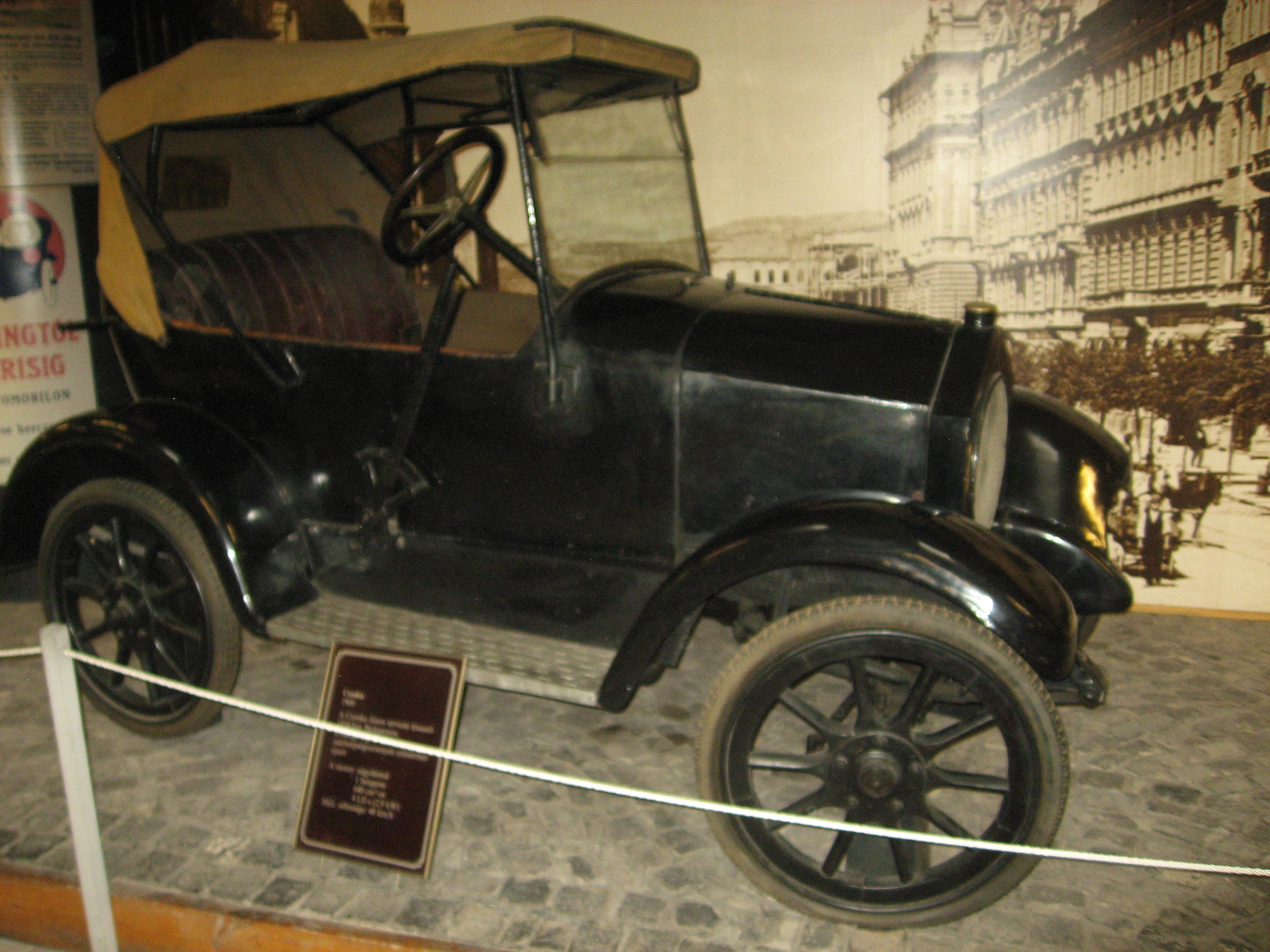 Budapešť